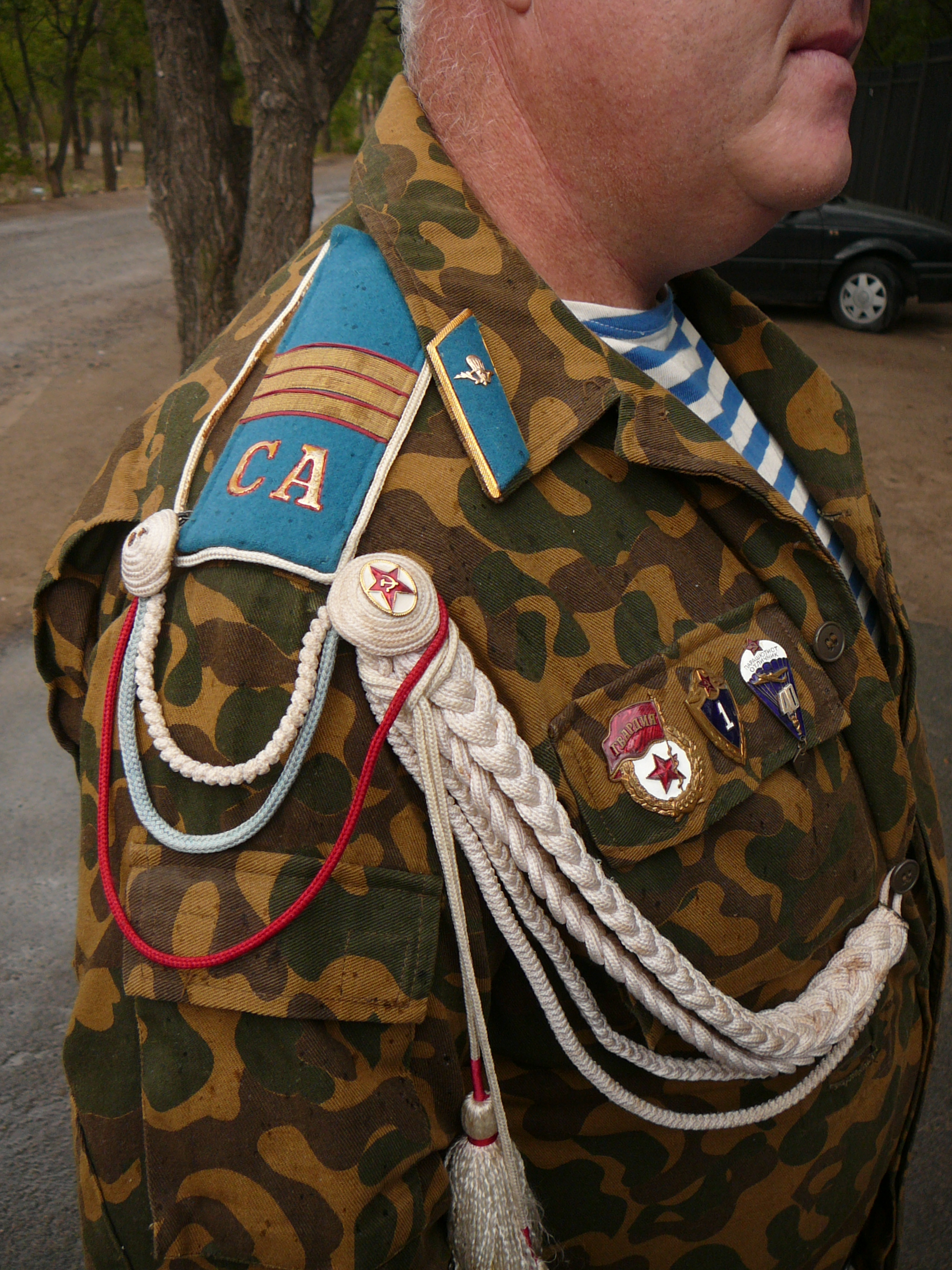 Неуставной "дембельский" самодельный аксельбант воздушно-десантных войск СССР. Использована красная управляющая стропа от парашюта Д-6-4 и звёзды с офицерских кокард.